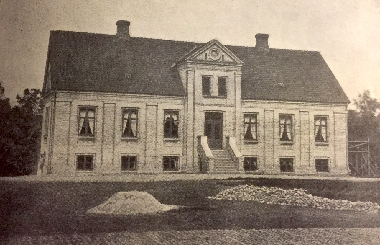 Hovedbygning.